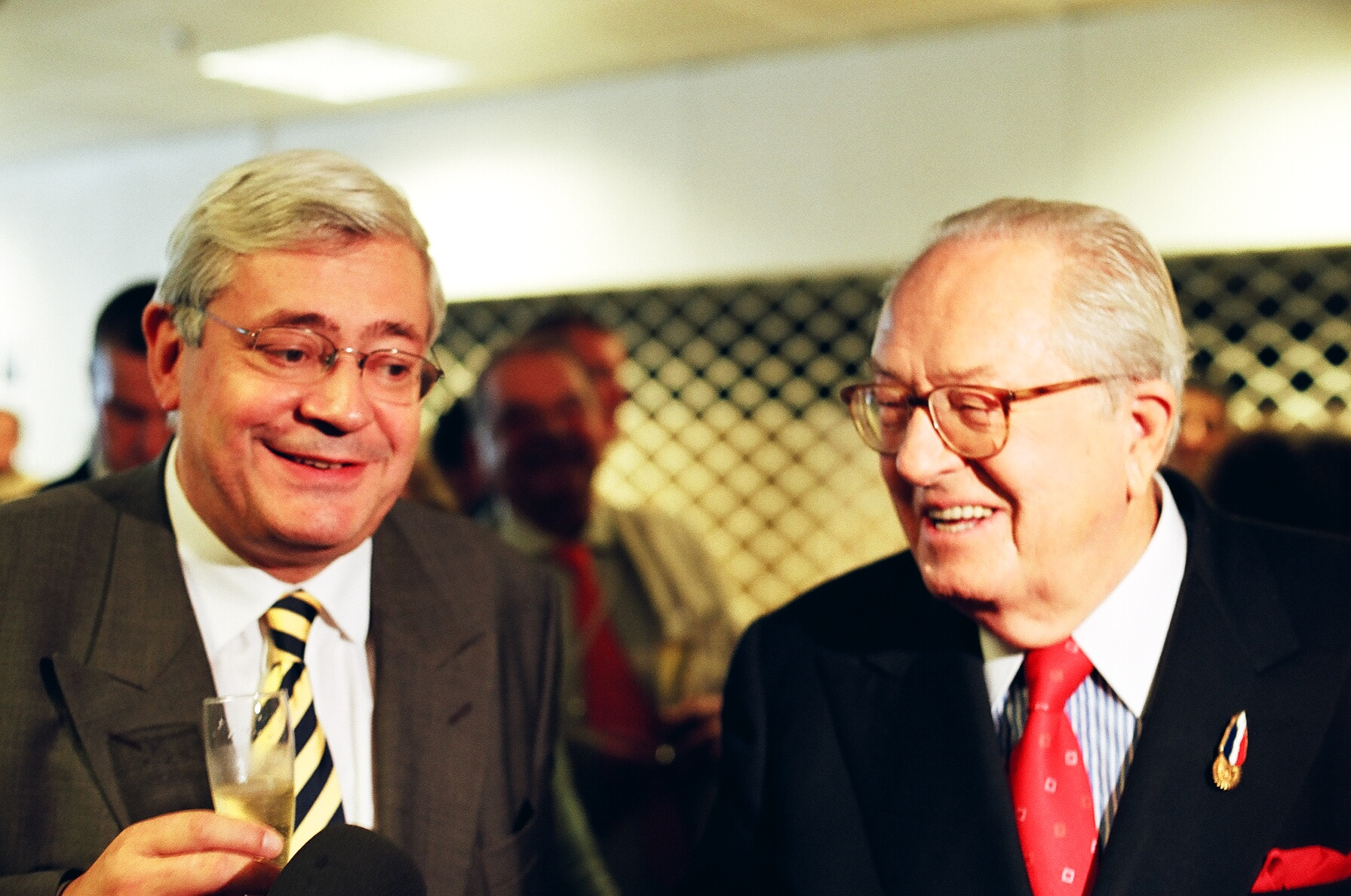 Bruno Gollnisch et Jean-Marie Le Pen à la fête des Bleu-blanc-rouge